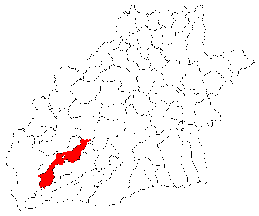 Categorie:Hărţi ale judeţului Sibiu